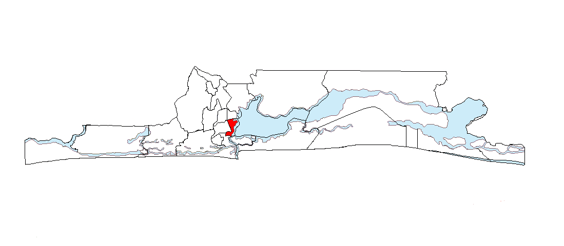 Ubicación de Lagos Continental (Lagos Mainland) en el Estado de Lagos